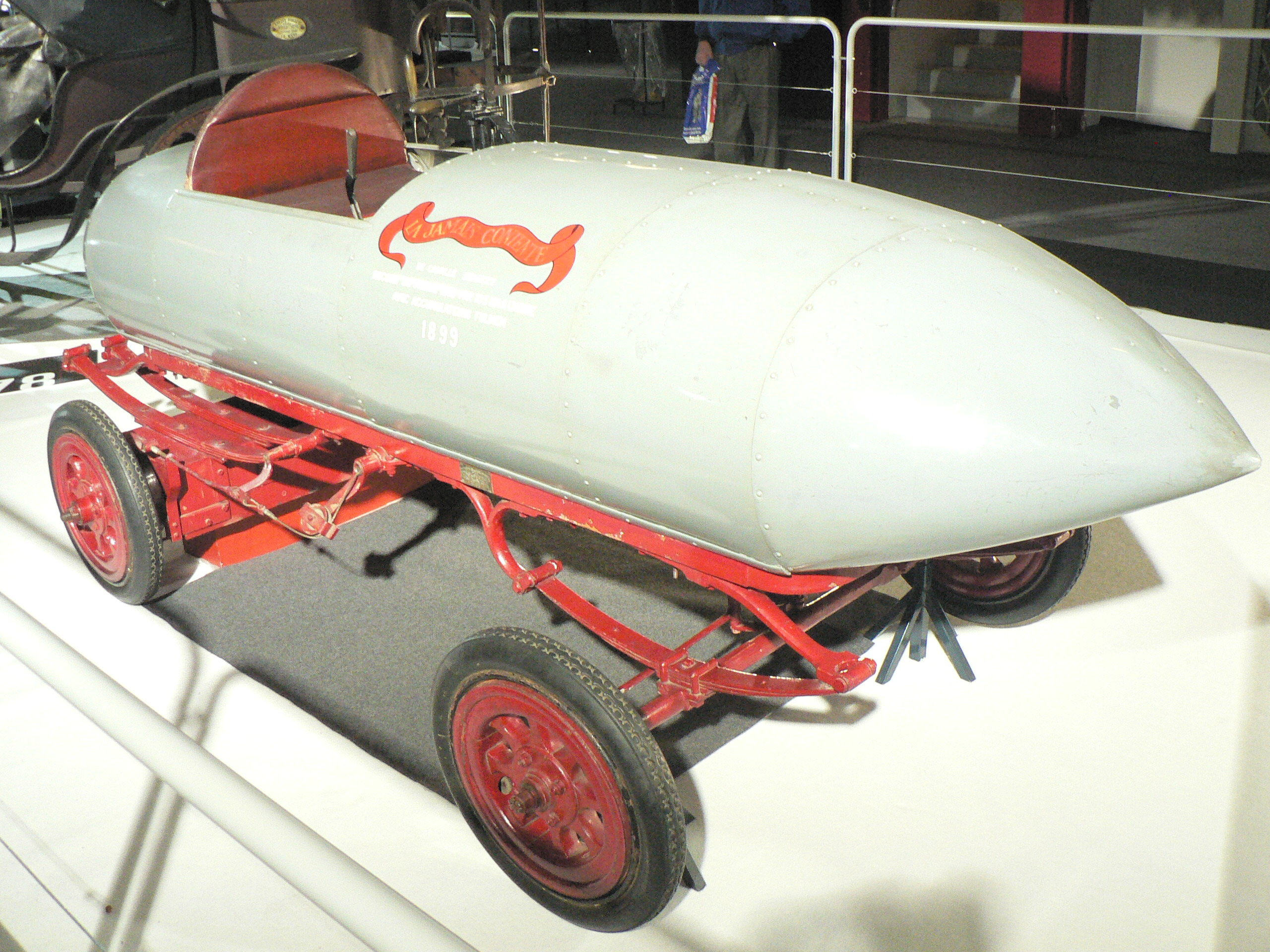 Mondial de l automobile de Paris (October 2006)